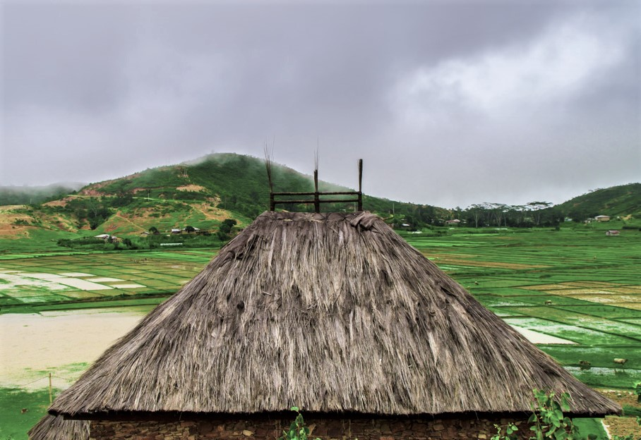 Reisfelder in Seloi Craic, Aileu.